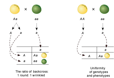 contoh skema persilangan balik untuk satu sifat beda